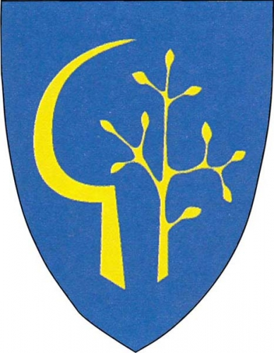 Bohutice, znak. V modrém štítě srp přivrácený ke vztyčené listnaté větvi, obojí zlaté.